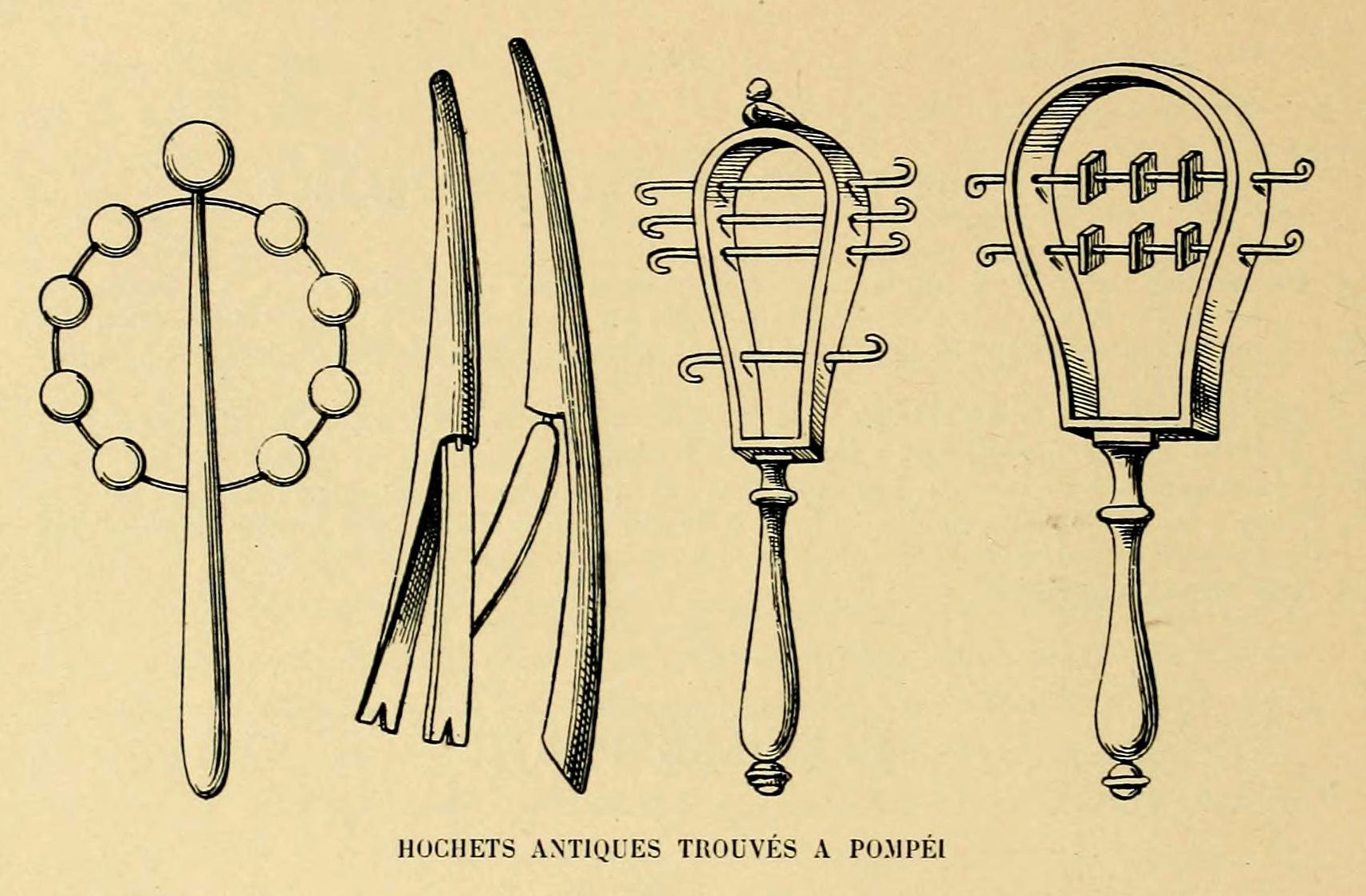 Illustration from Histoire des jouets